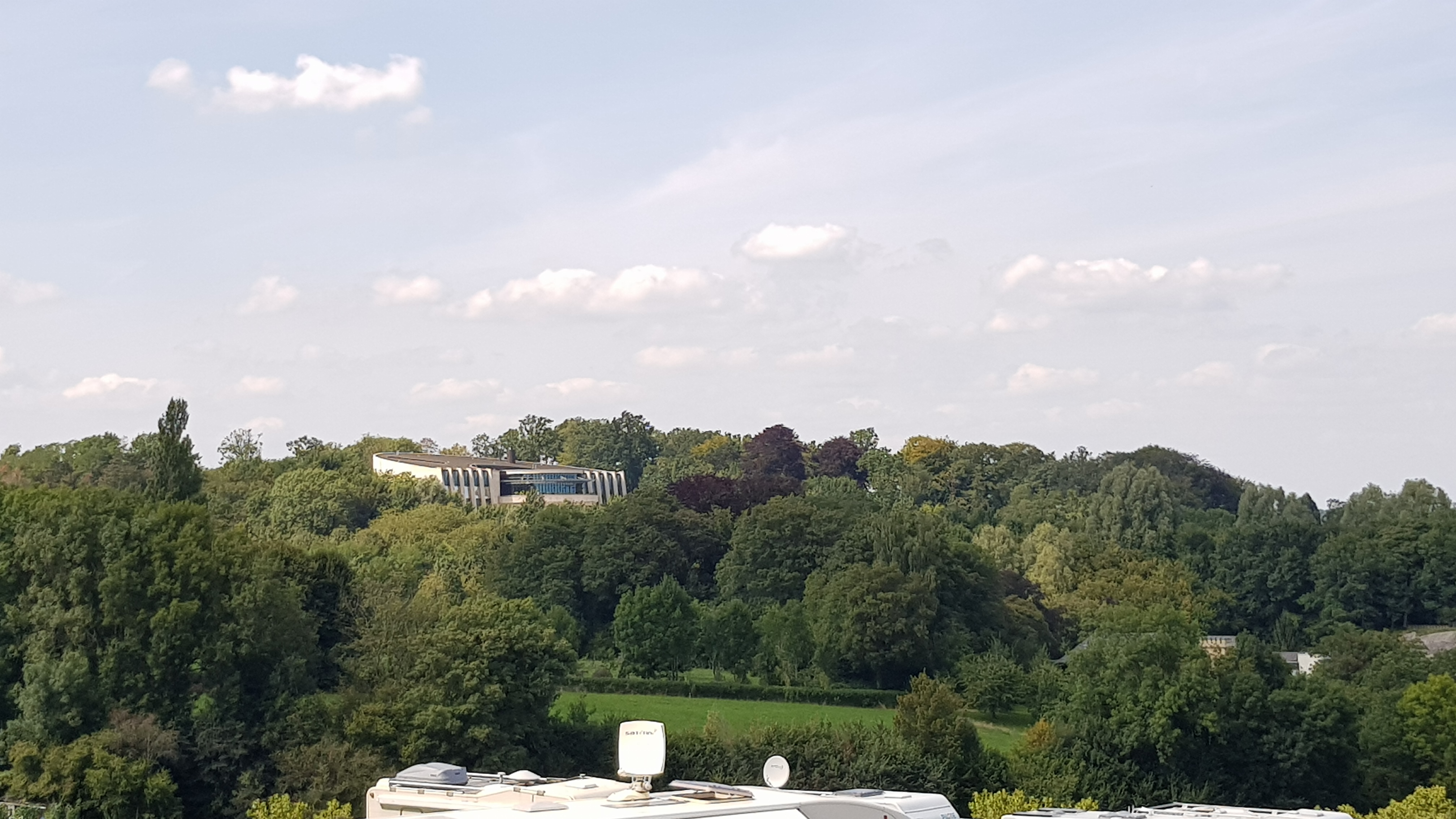 Holland Casino, Valkenburg aan de Geul, Nederland